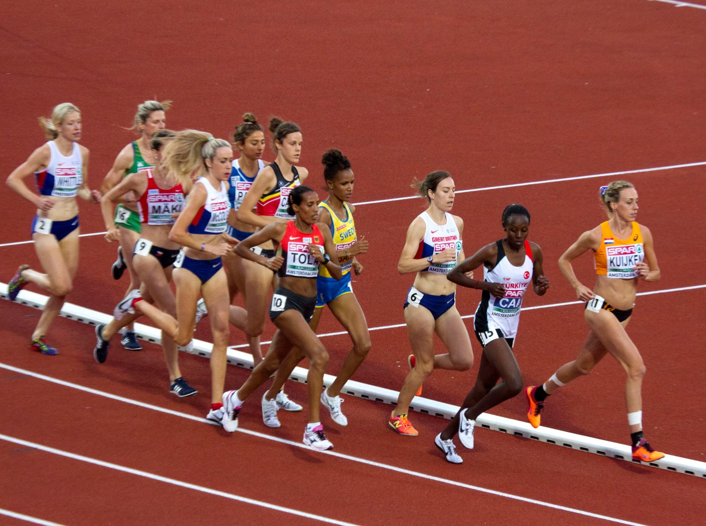 583 5000m dames